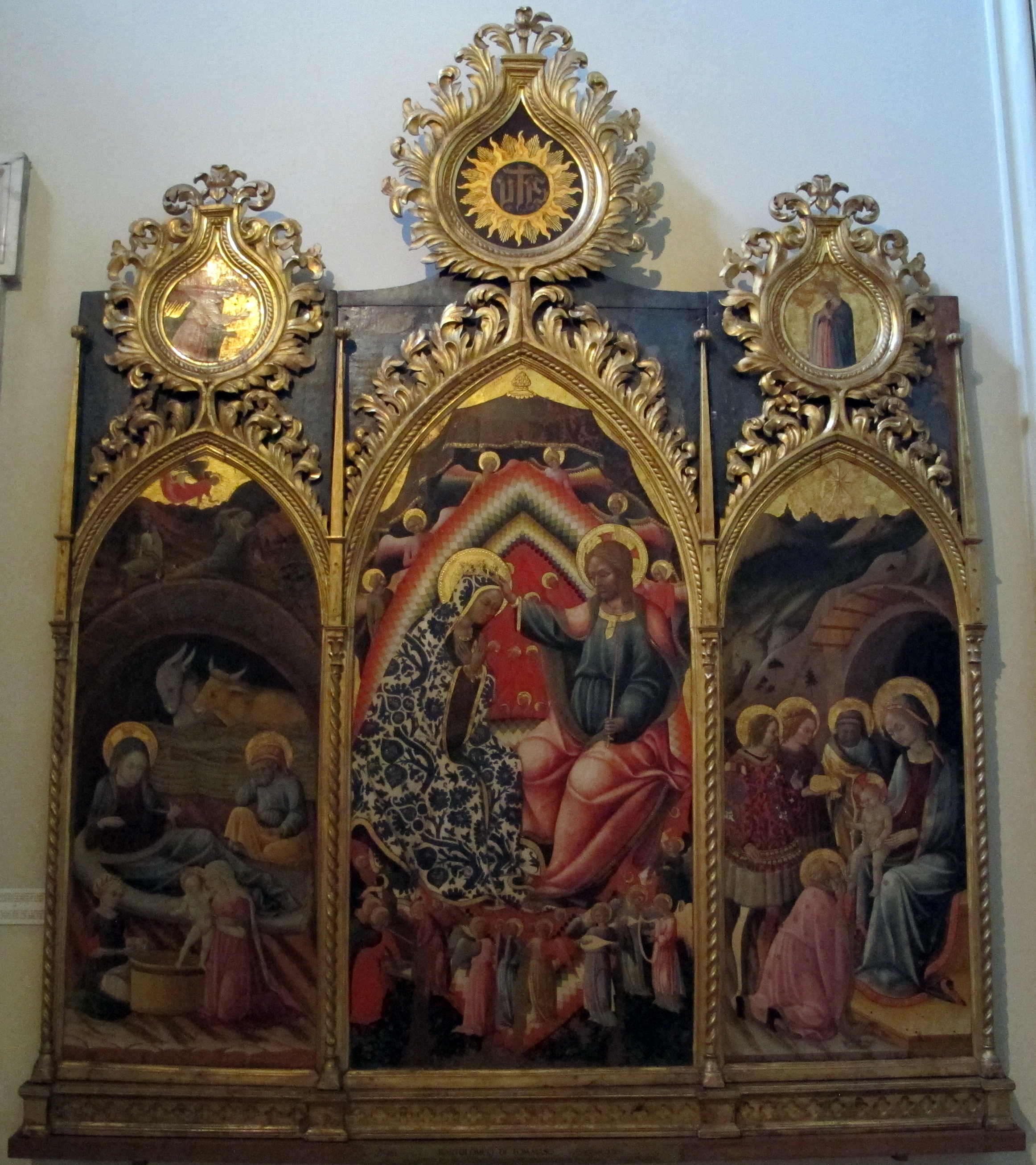 natività, incoronazione a dorazione dei magi